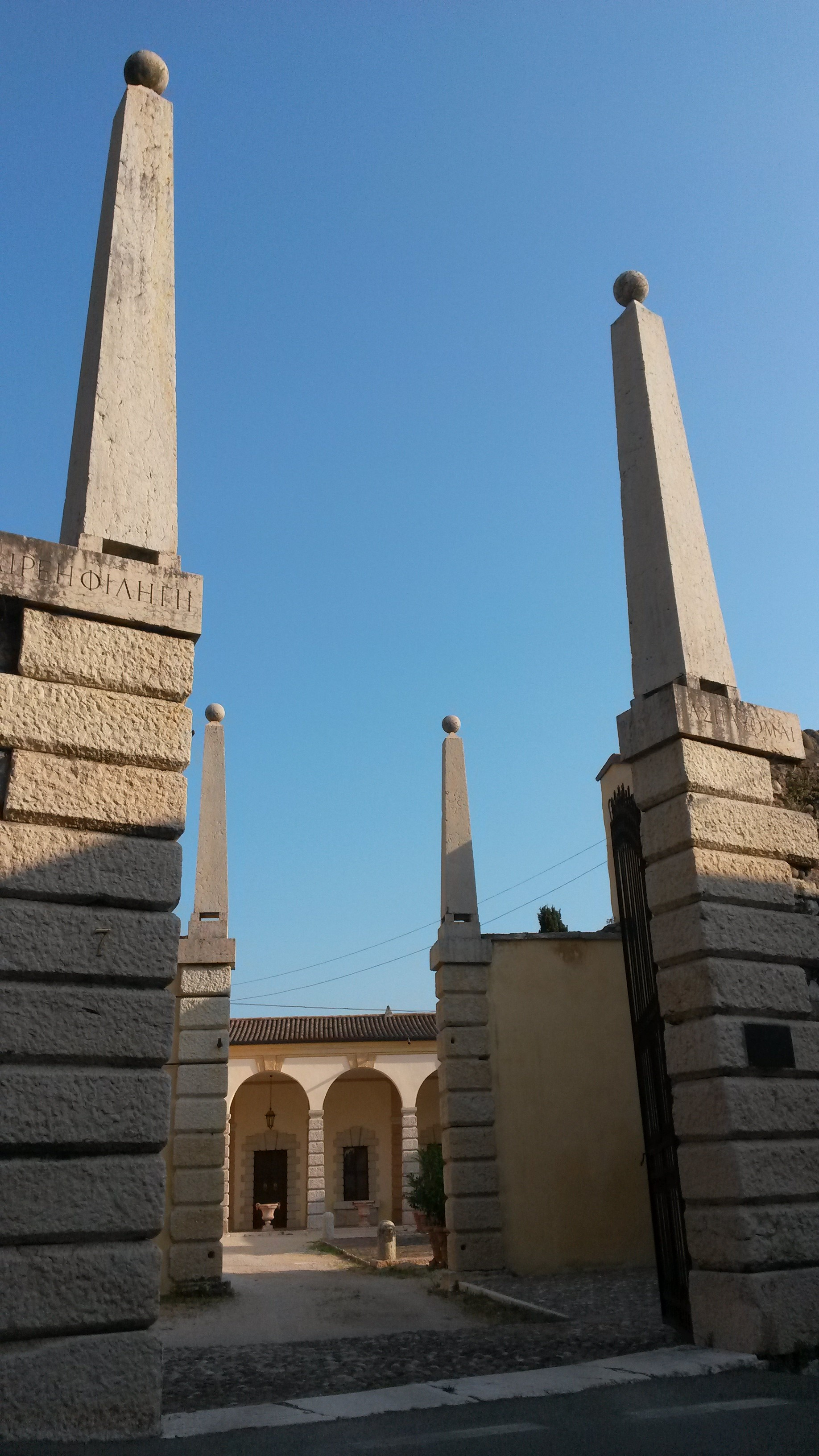 Portale d'ingresso alla corte (secolo XVI). Sotto gli obelischi, un'iscrizione in caratteri greci reca un saluto all'ospite e ricorda che la villa era luogo di ritrovi umanistici.